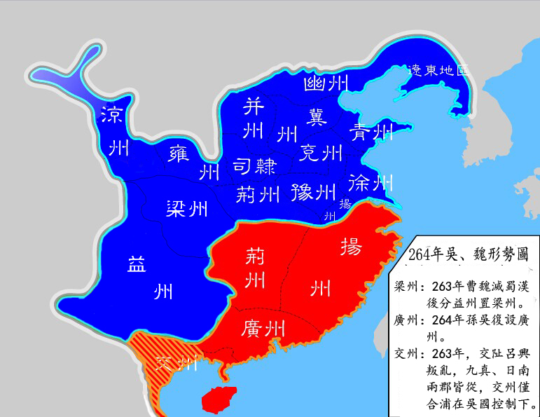 三國時期264年吳、魏形勢圖